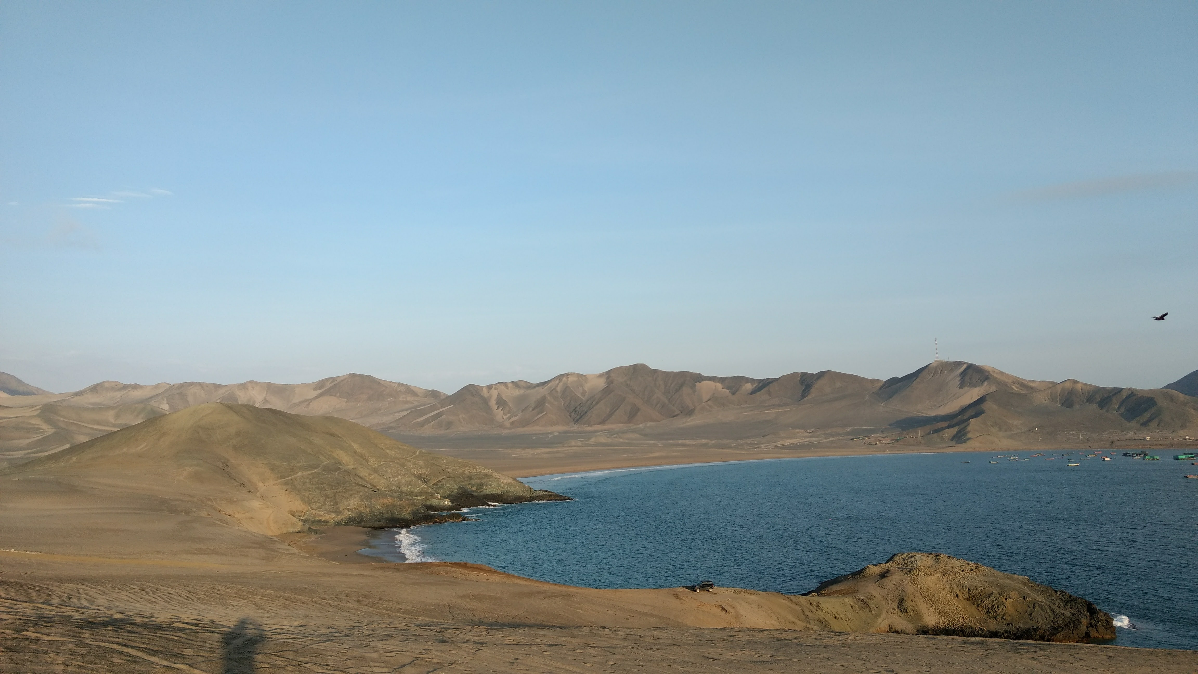 ES UNA PLAYA CASMEÑA MUY HERMOSA